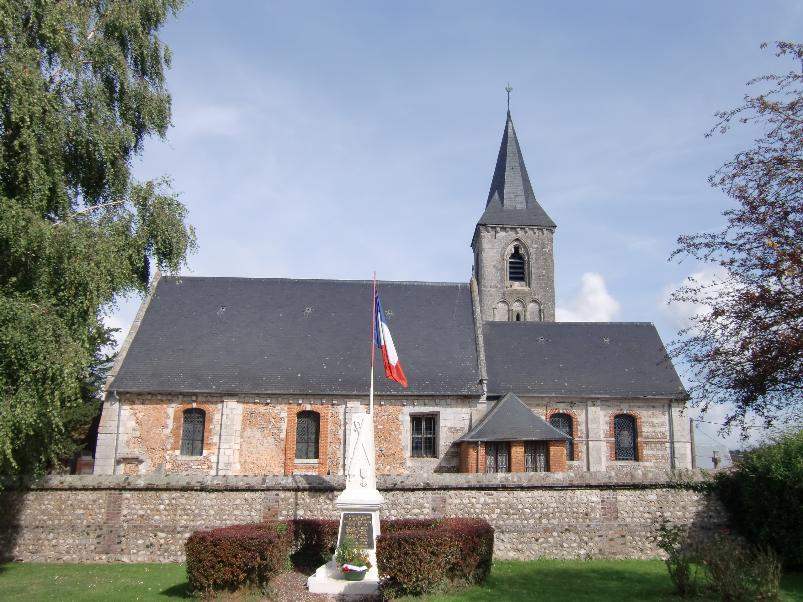 église Saint-Martin d'Eturqueraye (Eure, Normandie, France)